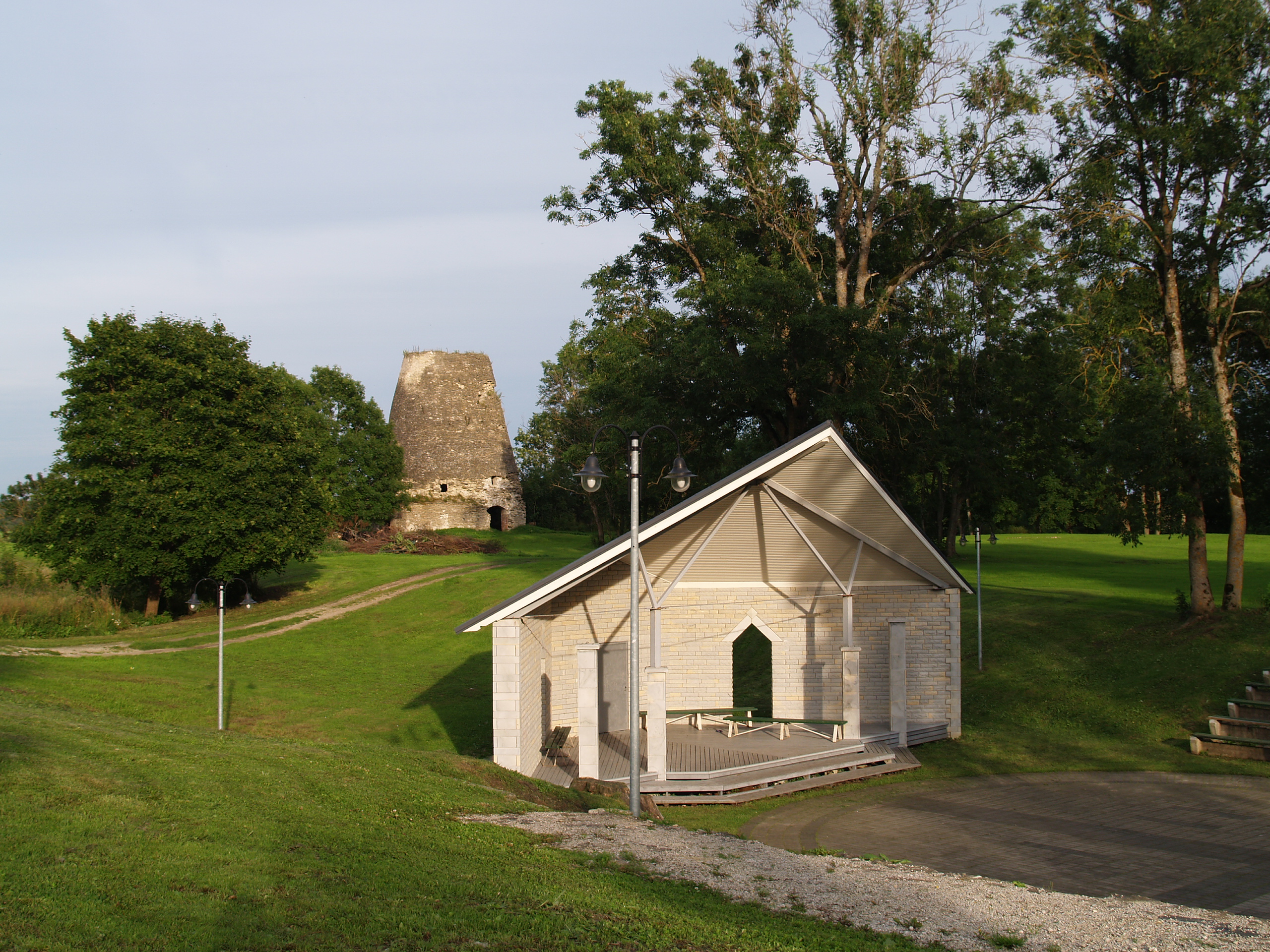 Lihula mõisa tuuleveski ja laululava